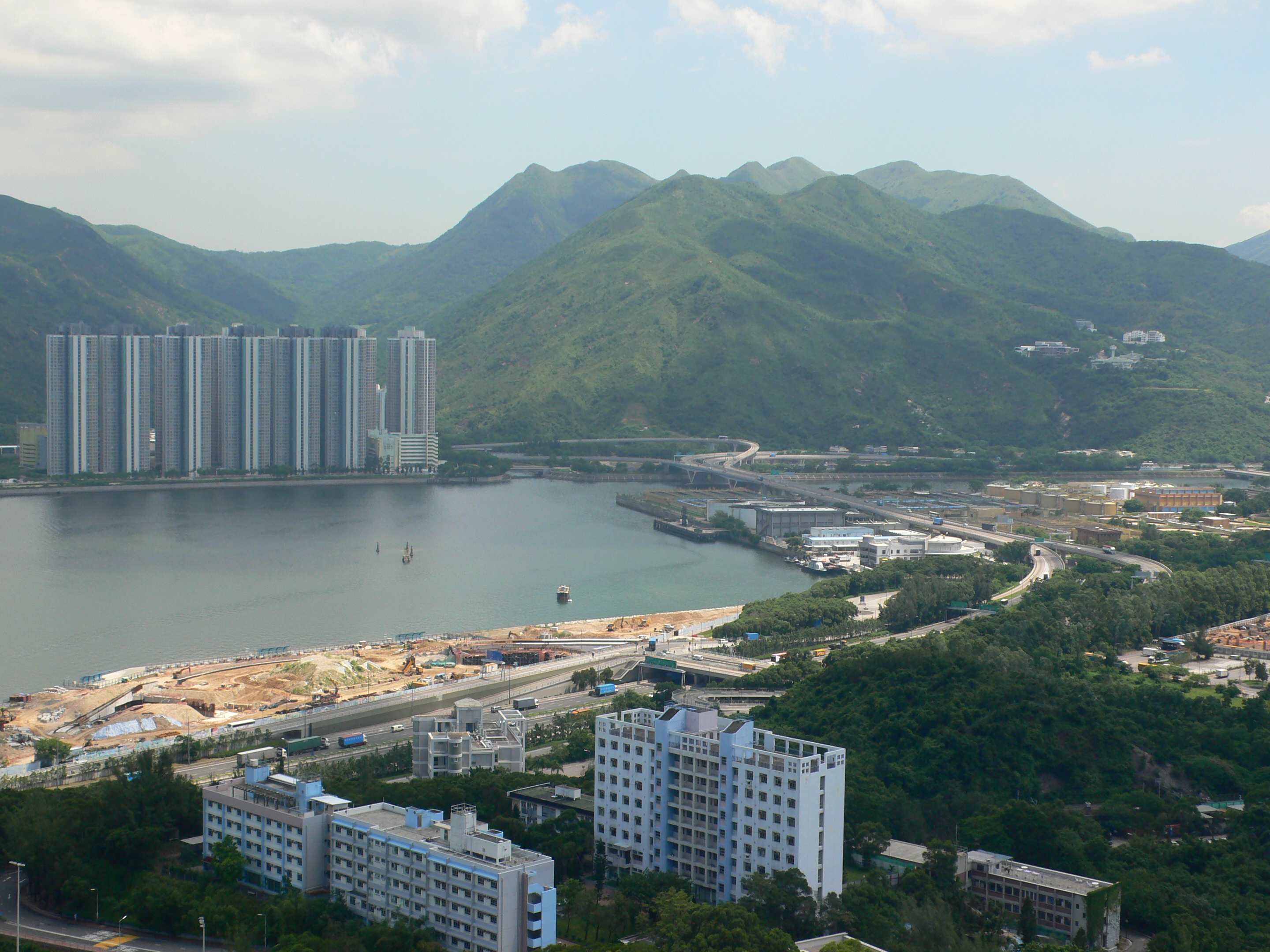 Also known as Sha Tin Hoi（沙田海），a bay in Hong Kong